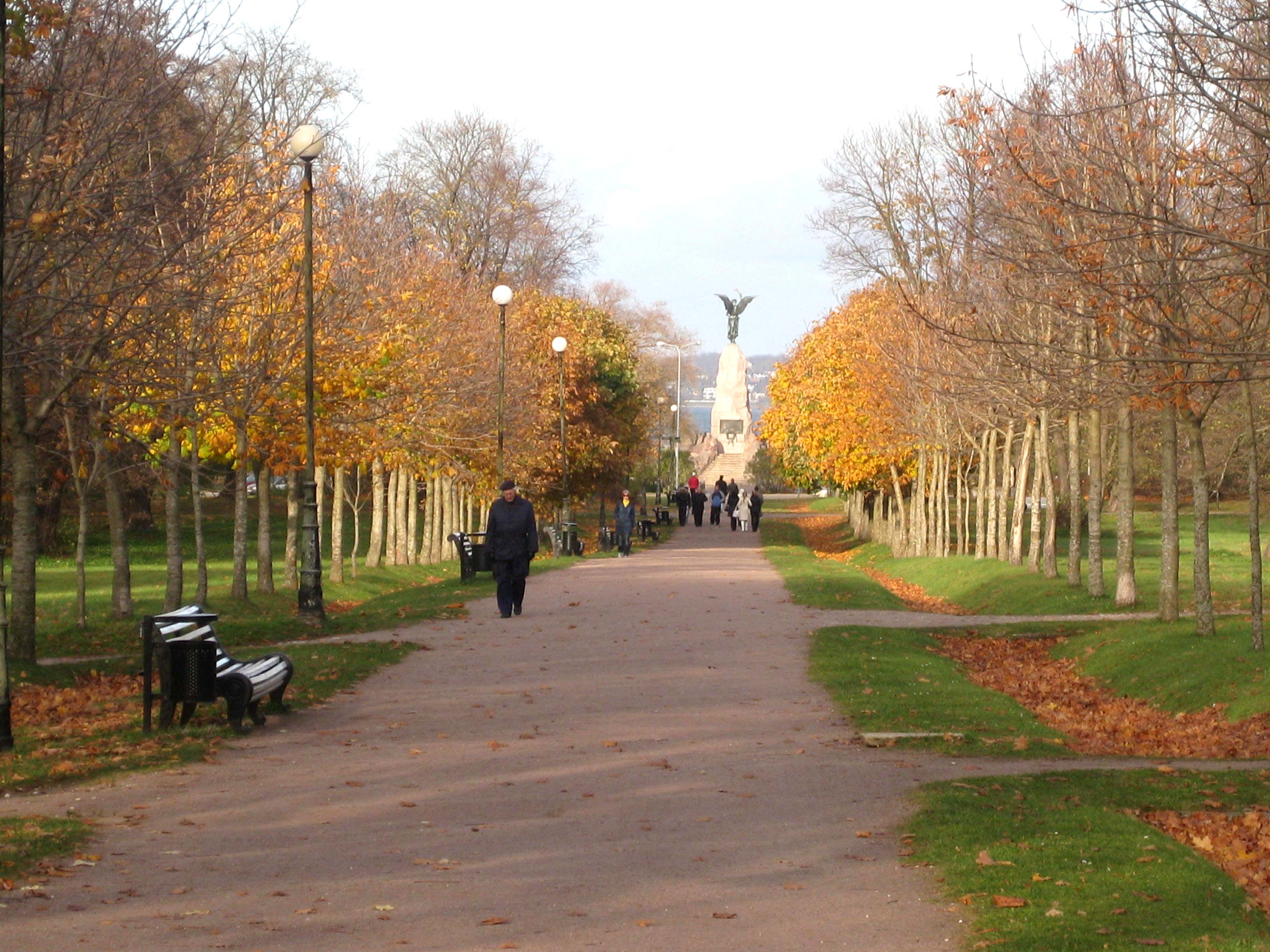 Аллея парка Кадриорг, Таллин